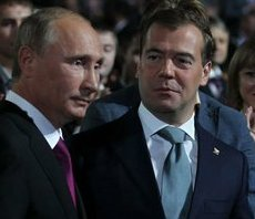 На съезде партии «Единая Россия».